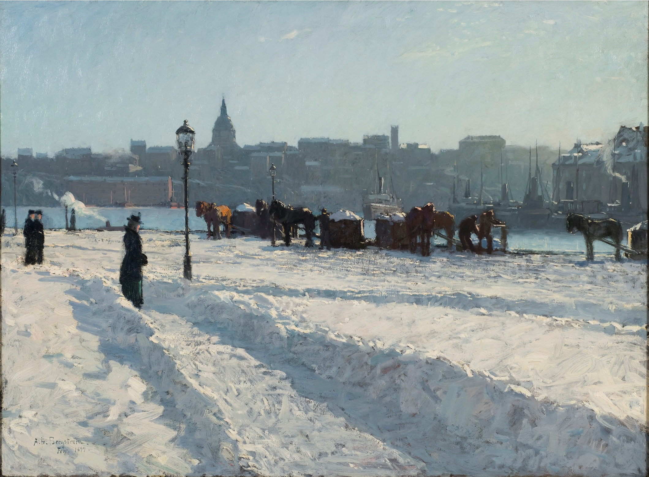 Wintermotiv aus Stockholmtitle QS:P1476,de:"Wintermotiv aus Stockholm"